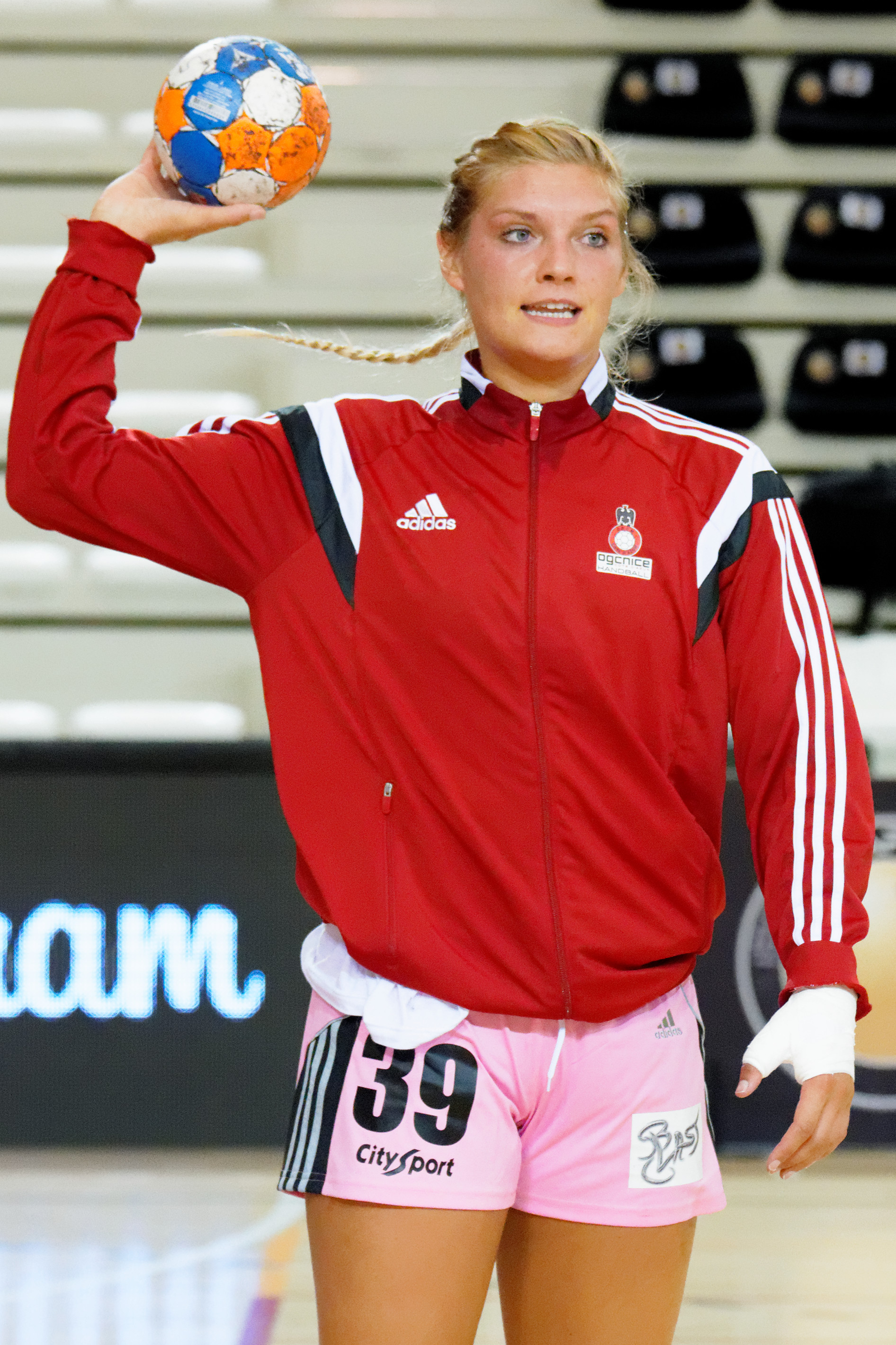 Arna Sif Pálsdóttir, le 18 septembre 2015 lors du match Issy Paris Hand / OGC Nice Côte d'Azur.